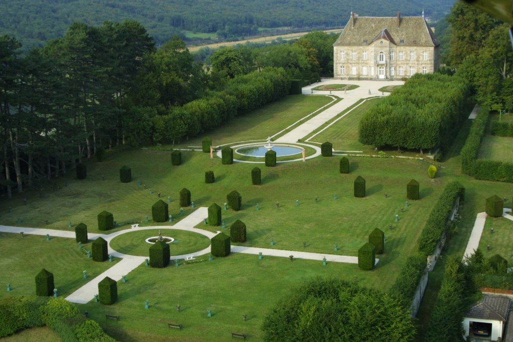 Château & Jardins de Vaire-Le-Grand - Franche Comté - France